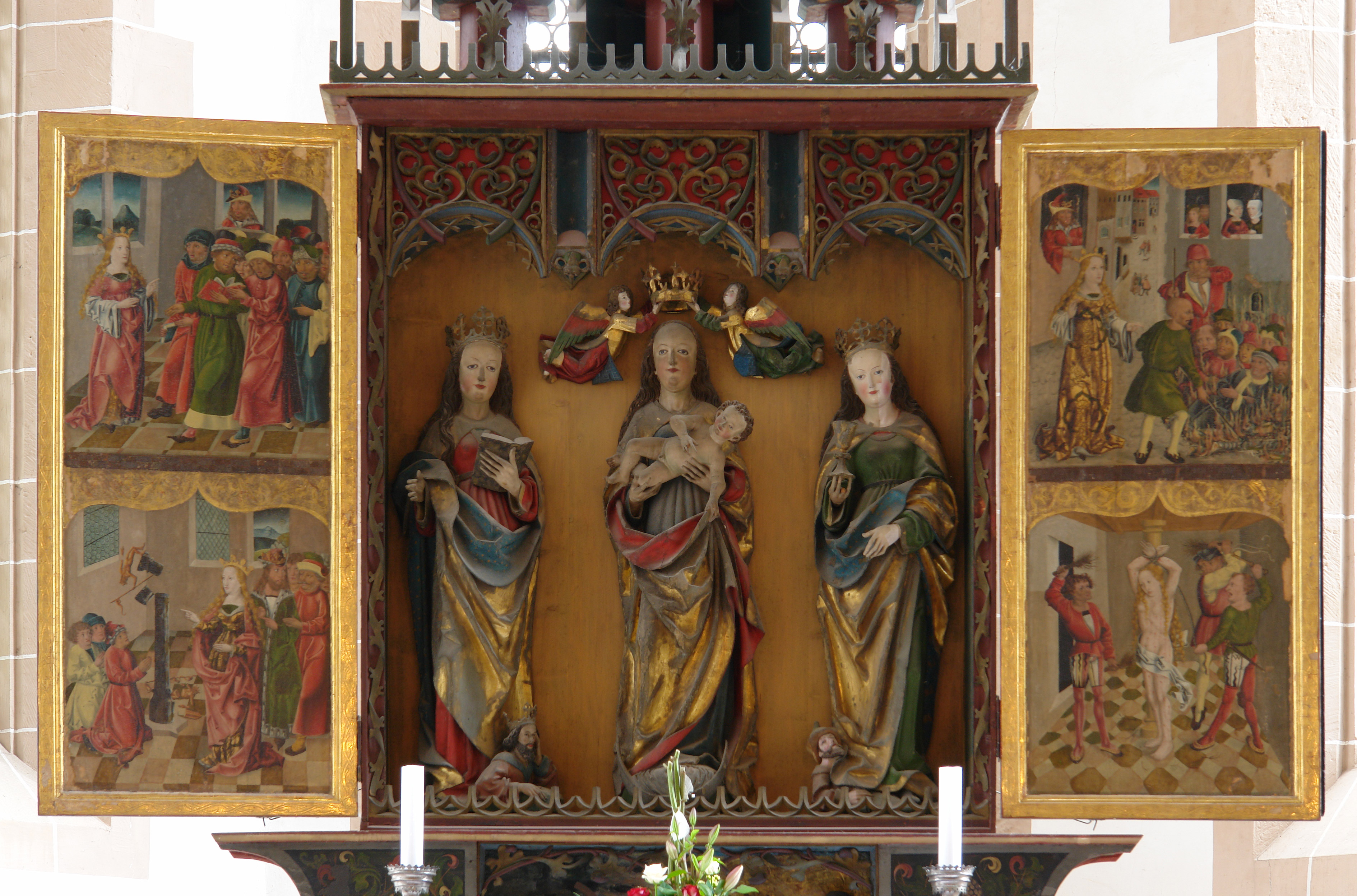 Detail des Altar der Schloßkirche Chemnitz ehemals in der St. Katharinenkirche Großenhain (1869 abgerissen)